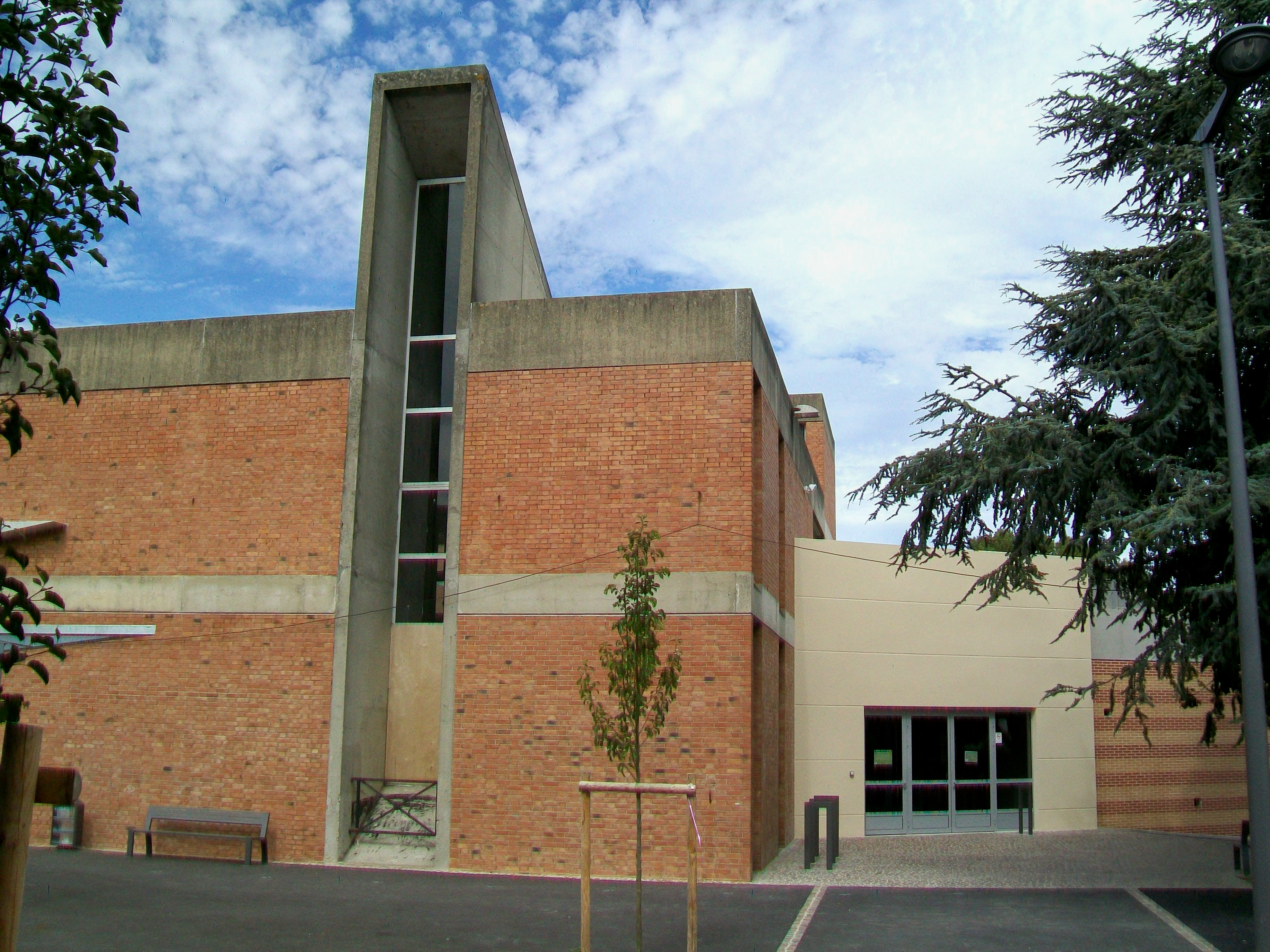 La médiathèque Boris-Vian, place Salvador-Allende, au centre-ville.